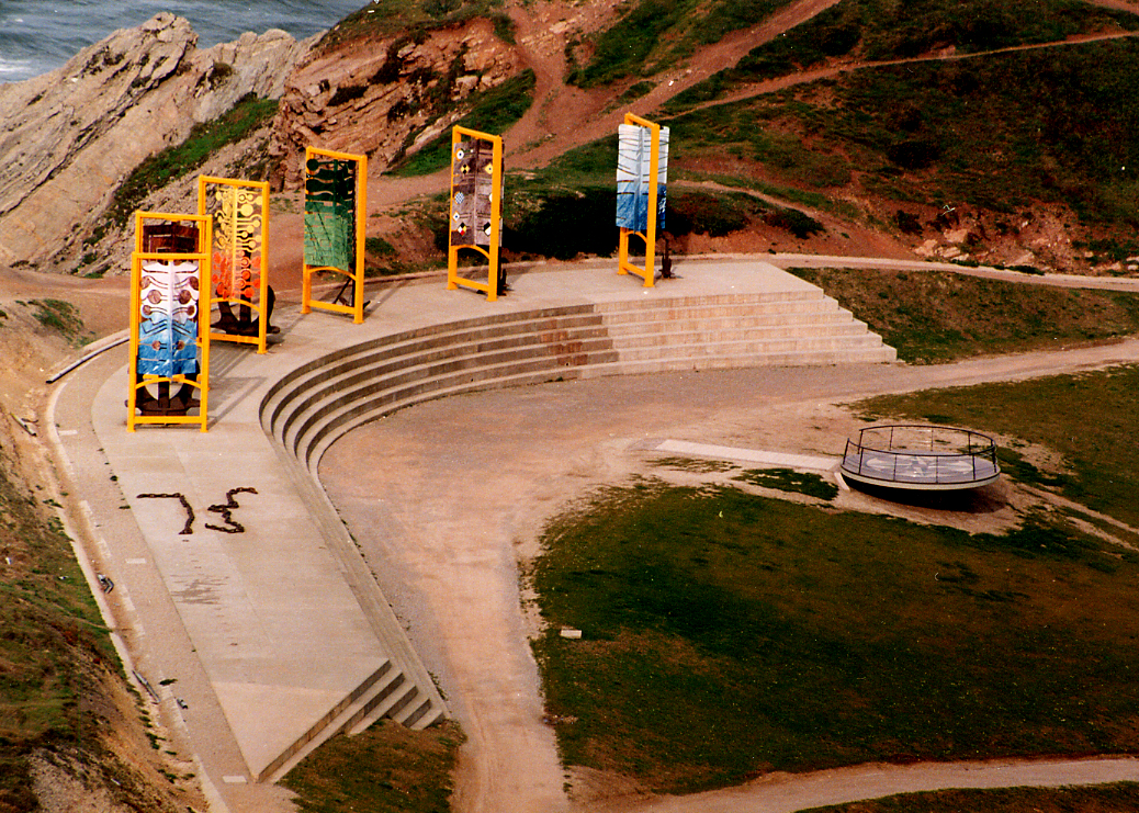 Estado original de las Velas con su color original, las Velas fueron pintadas por el propio autor, Lucio Marcos Pernia.